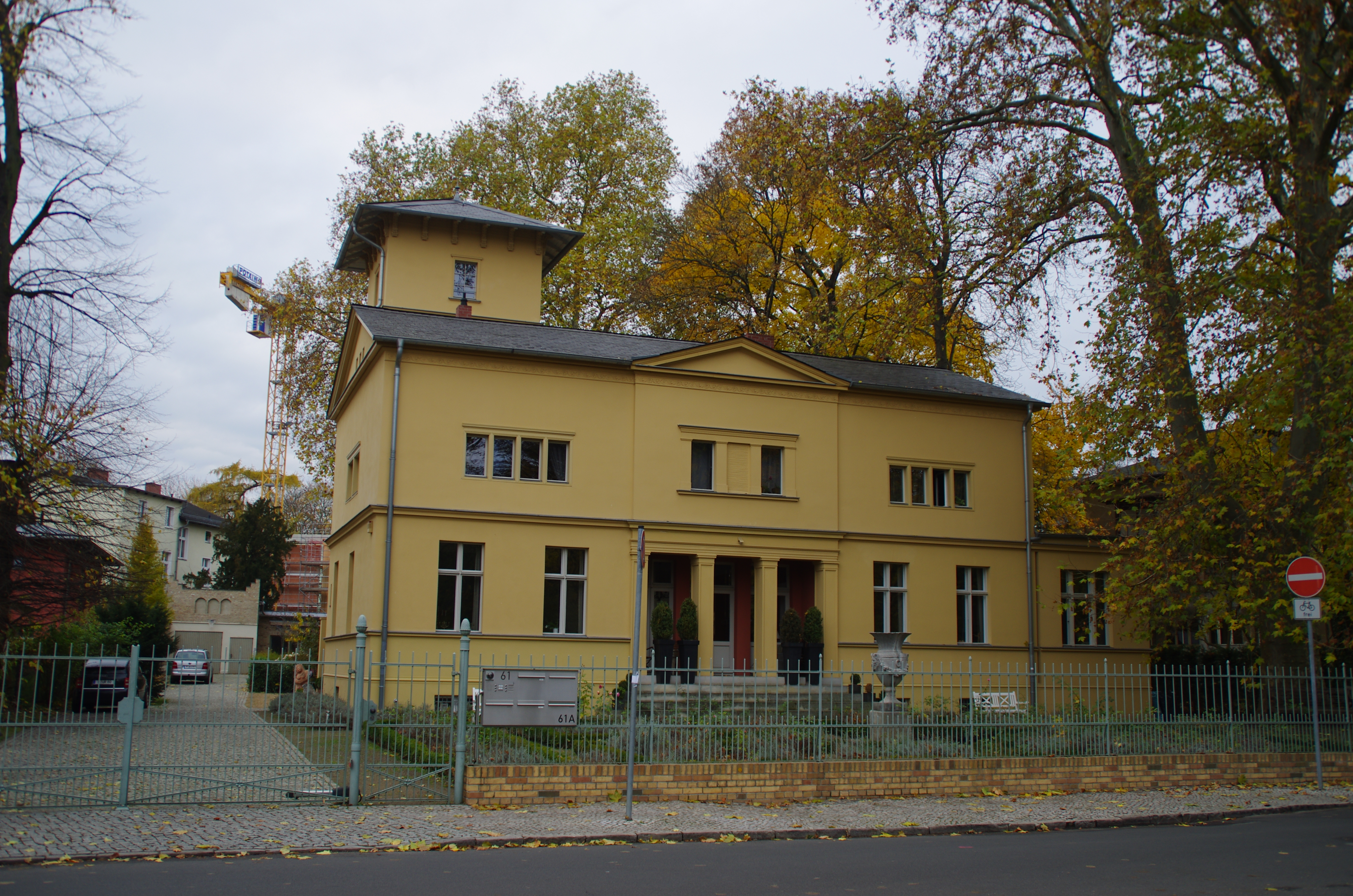 Potsdam in Brandenburg. Das Haus in der Große Weinmeisterstraße 61 steht unter Denkmalschutz.